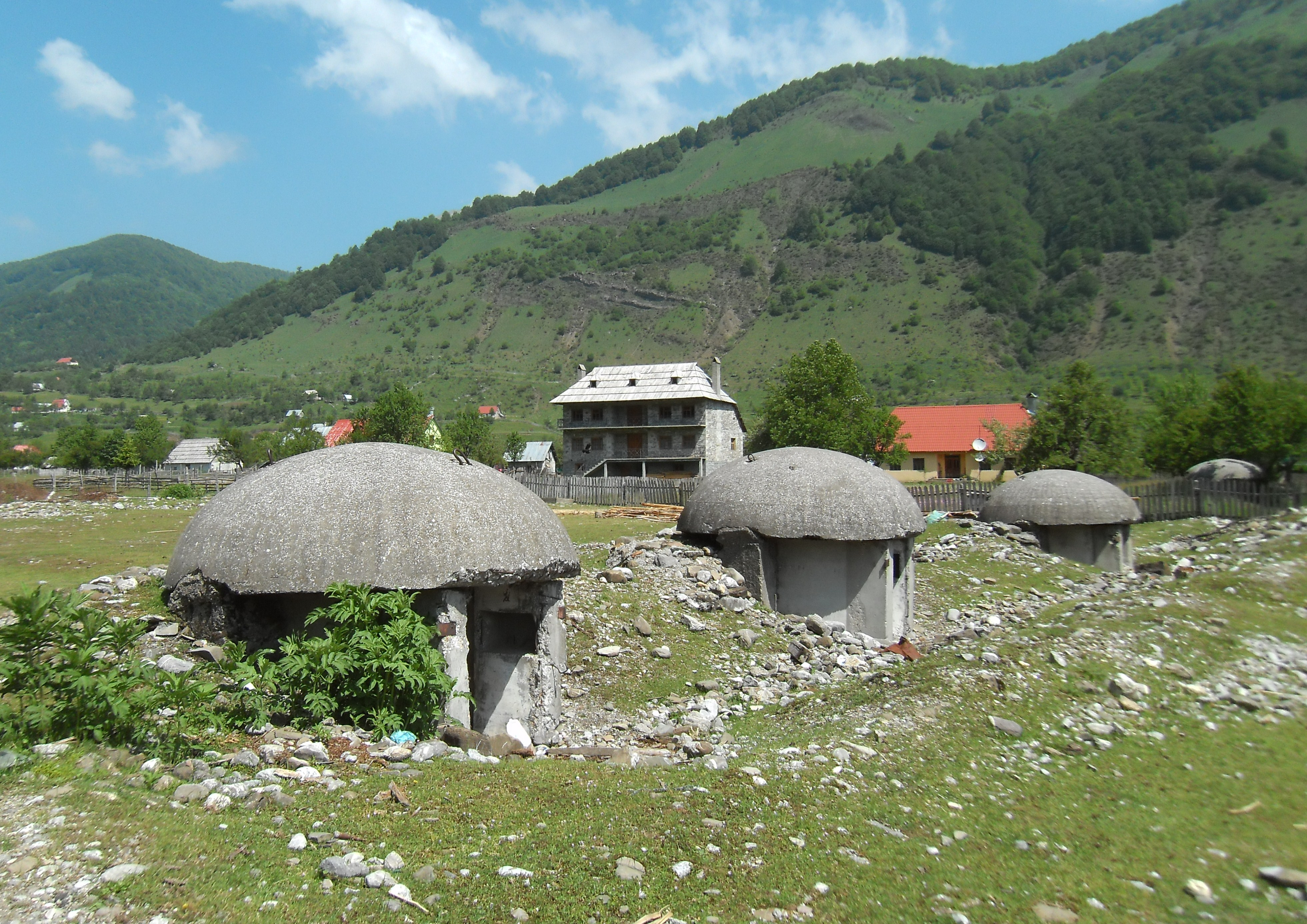 Die typischen Ein-Mann-Schützenbunker aus alten Kriegszeiten in Vermosh, Albanien